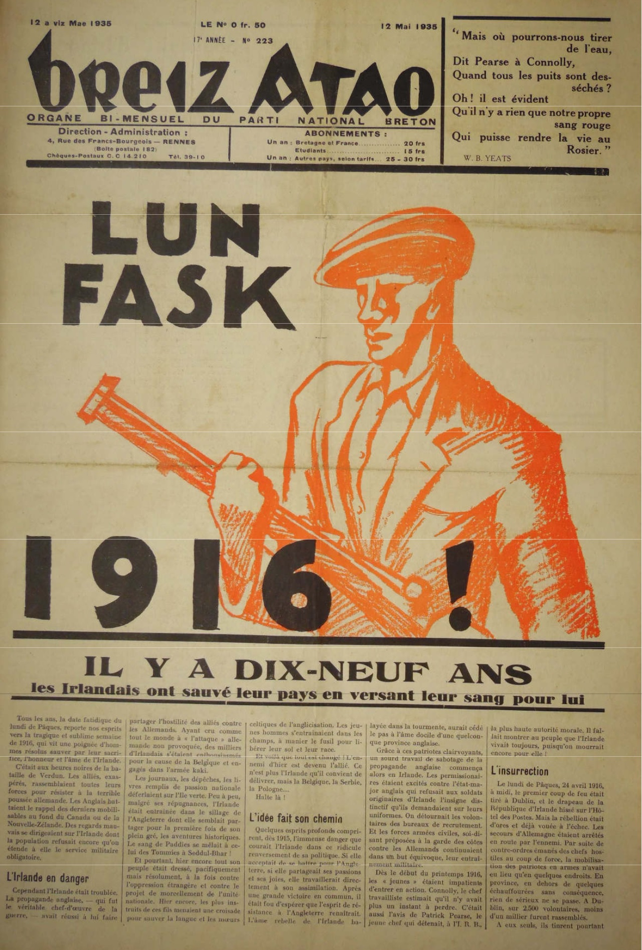 Une du journal Breiz Atao du 12 mai 1935, célébrant les 19 de l'insurrection de Pâques irlandaise de 1916.